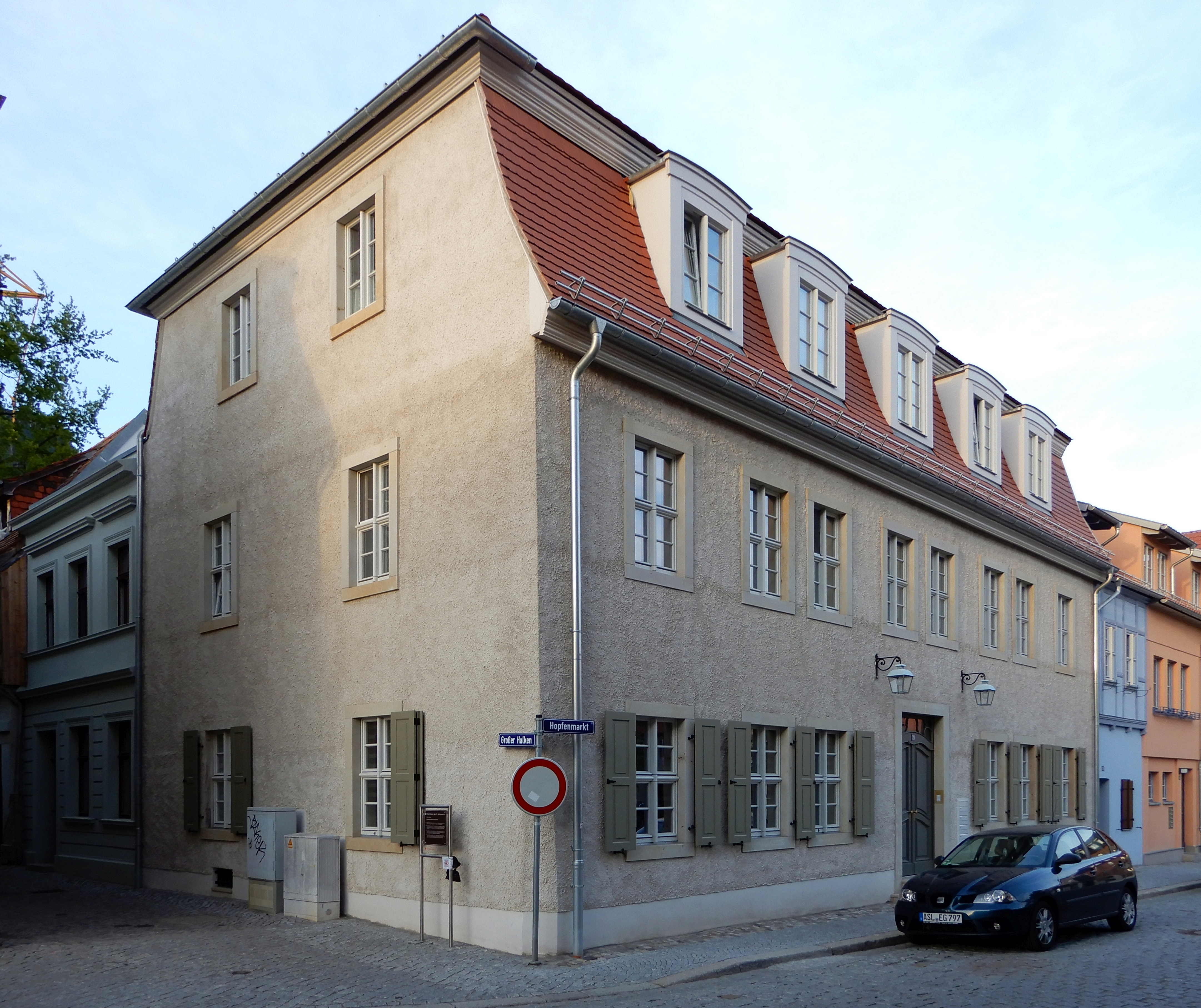 Gebäude Hopfenmarkt 20 in Aschersleben, nach der Sanierung